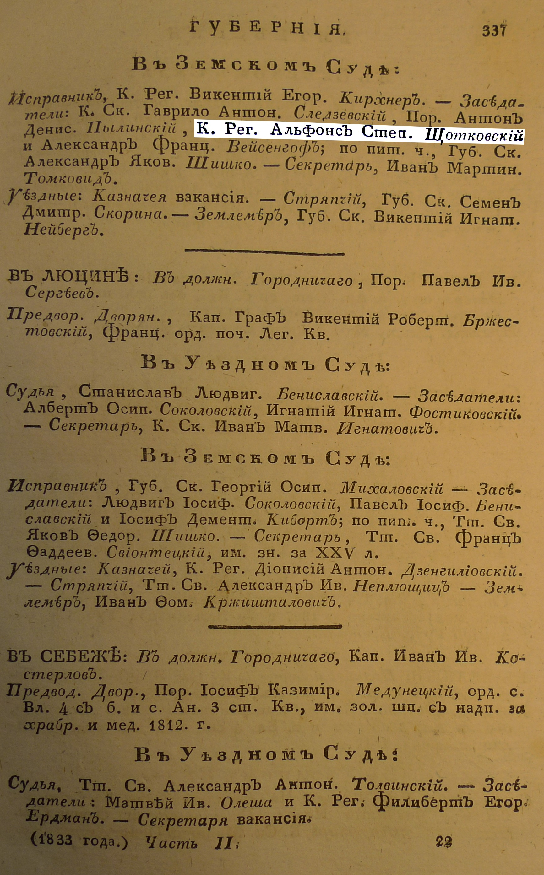 Месяцослов с росписью чиновных особ, или общий штат Российской Империи на лето от рождества Христова 1833. Часть вторая. Режица (Рѣжица), (Въ Земскомъ Судѣ), Альфонс Степанов Щотковский (Альфонсъ Степанов Щотковскїй)